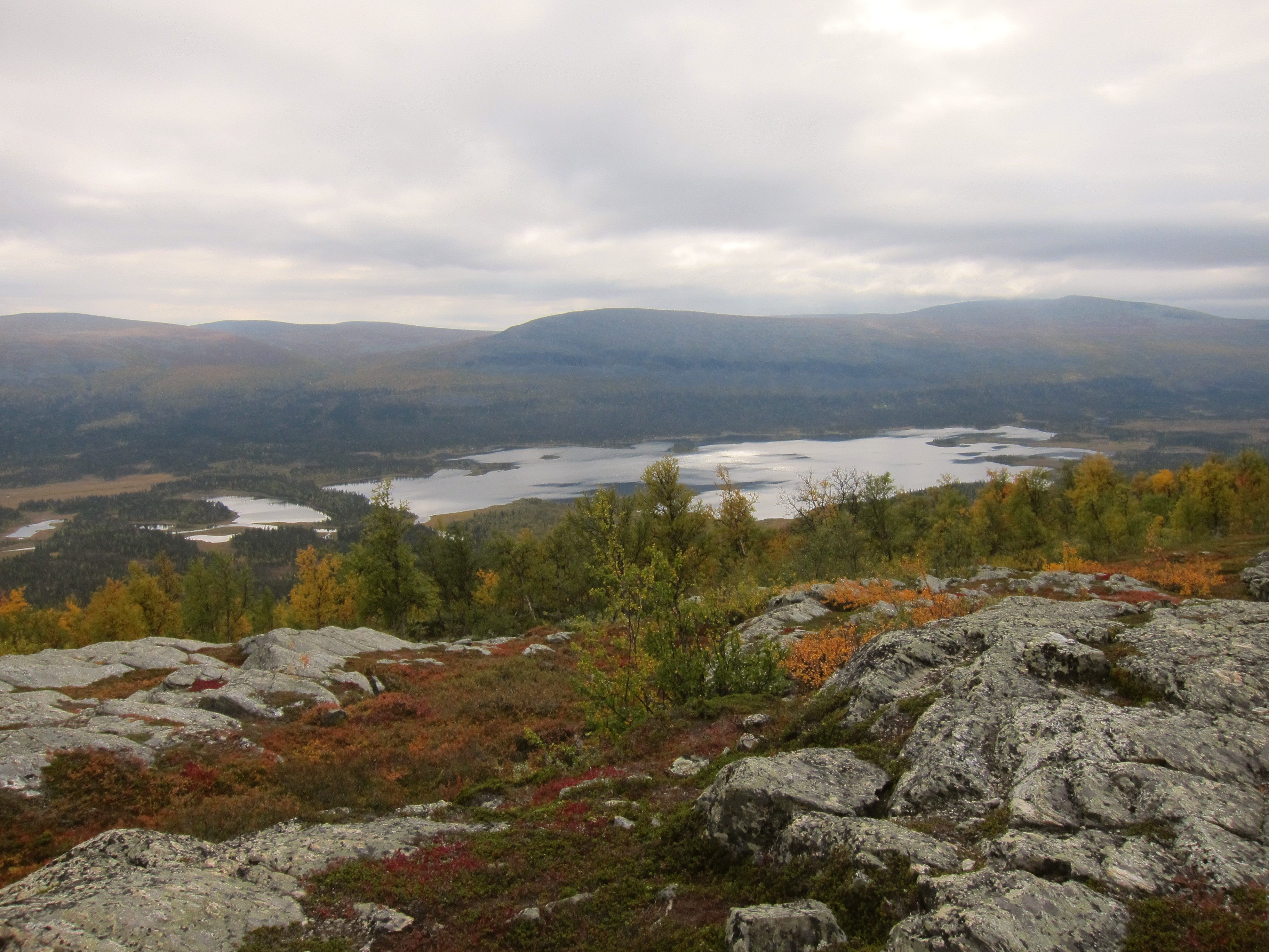 Sjön Rittak sett från kungsleden.